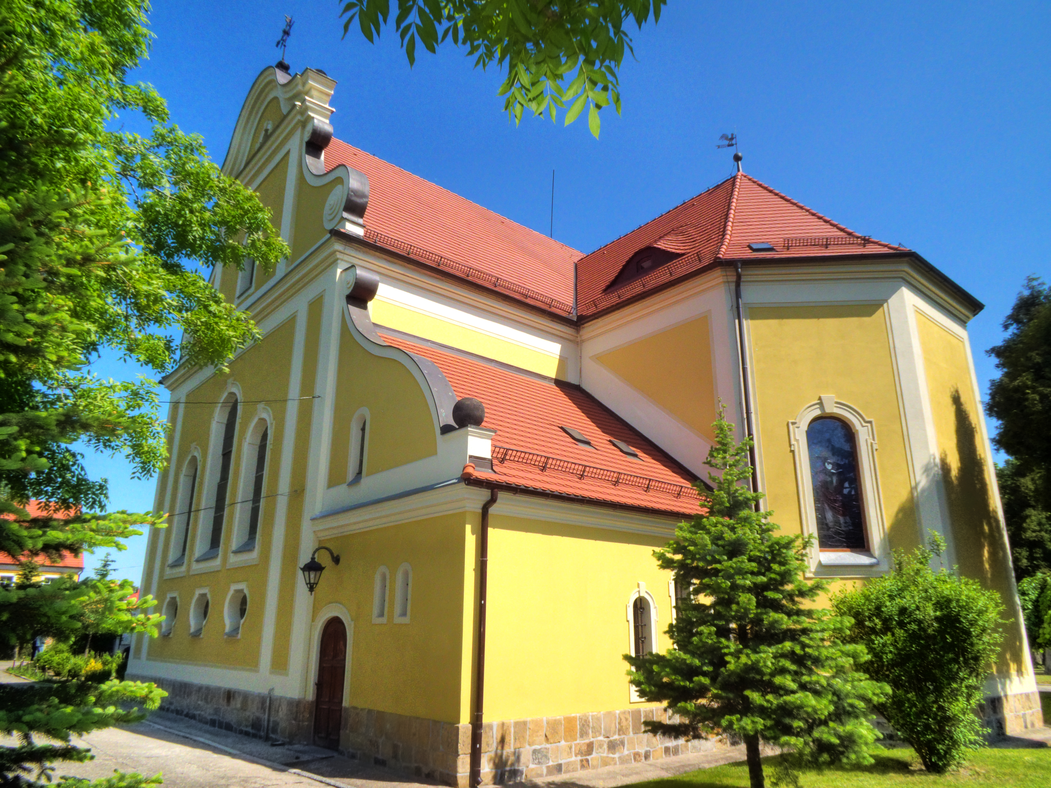 Wnętrze kościoła św. Jana Chrzciciela i św. Mikołaja w Nysie - zewnętrzna elewacja prezbiterium